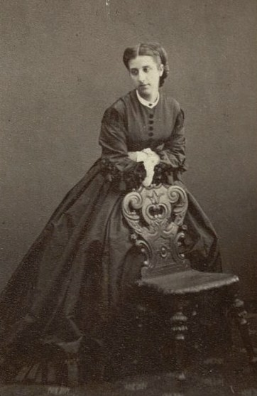 Мария Элимовна Демидова, ур. Мещерская (1844-1868)